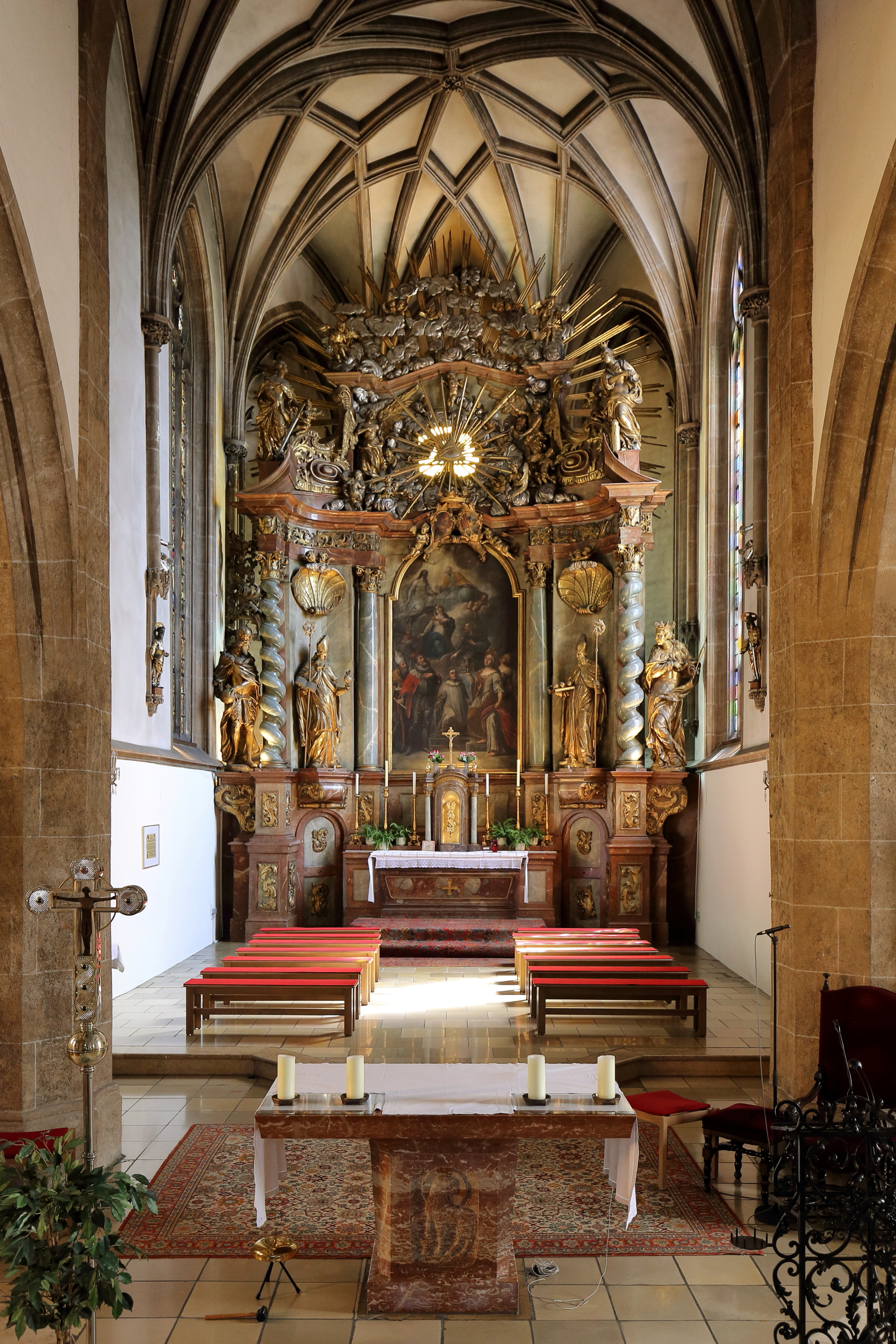 Altarraum der röm.-kath. Pfarrkirche hl. Kunigunde in der niederösterreichischen Marktgemeinde Brunn am Gebirge. Die Einrichtung der gotischen Kirche wurde um 172/30 barockisiert.